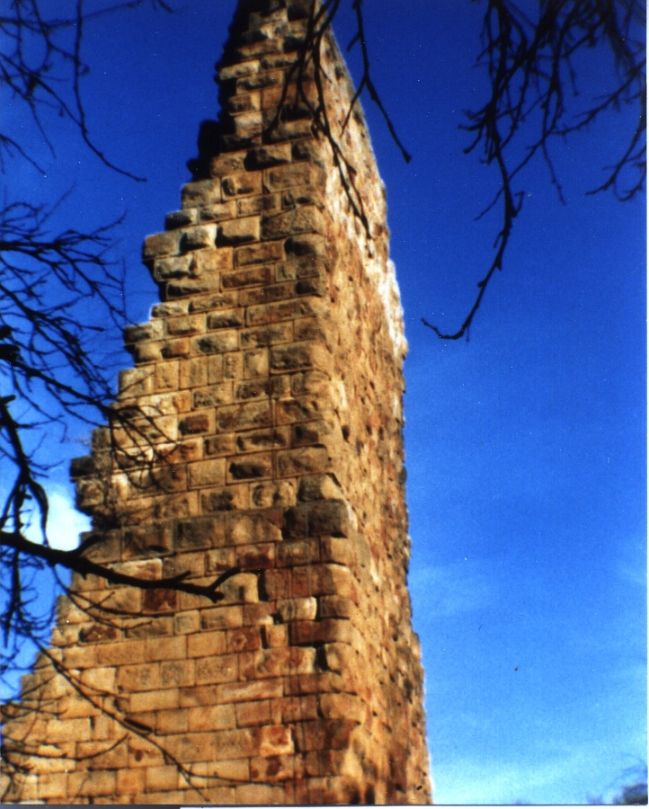 Burg Odenbach (Glan)